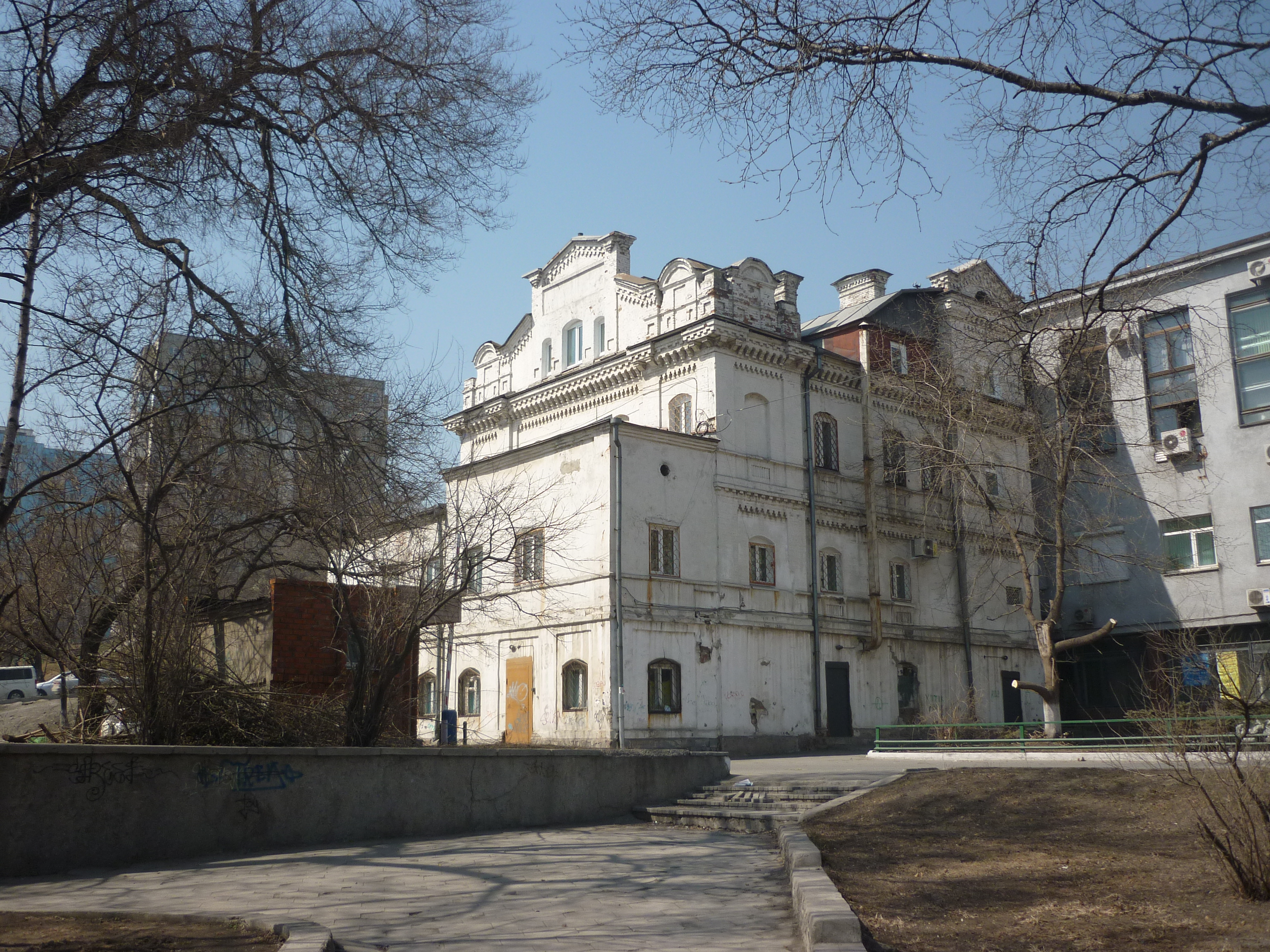 Владивосток, ул. Шефнера, 6 - баня Дивулиной